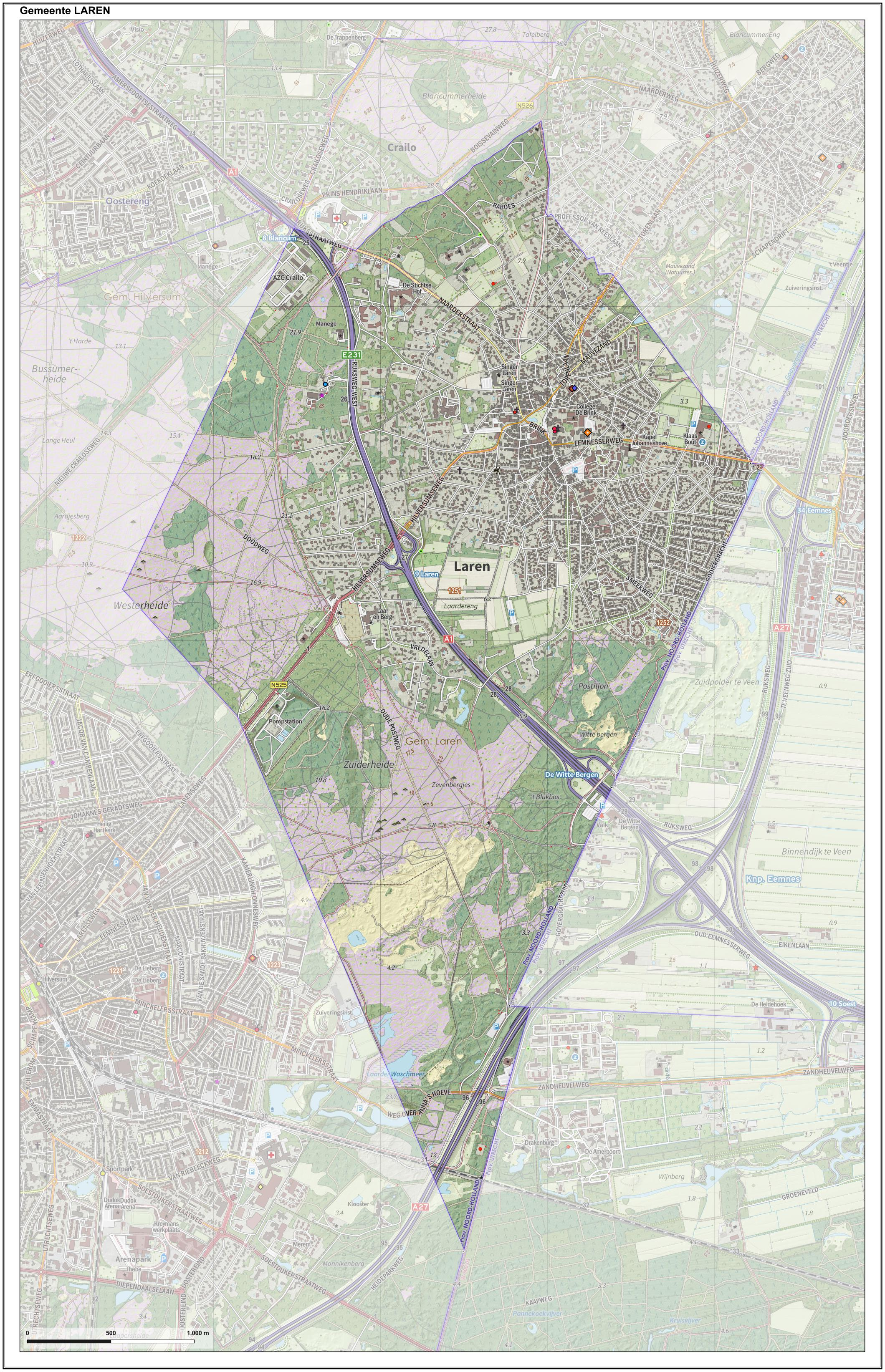 Topografische gemeentekaart. Resolutie: 400 pixels/km. Kaartbeeld samengesteld uit de open geodata van de Top10NL en Top25namen (Kadaster), Creative Commons-BY licentie. Gebouwvlakken uit open geodata BAG extract. Wegen uit de OpenStreetMap, OpenStreetMap community. Reliëfschaduw uit de Actuele Hoogtekaart AHN2. Samenstelling en kleurenschema: Jan-Willem van Aalst, met QGIS. Zie ook de Legenda.